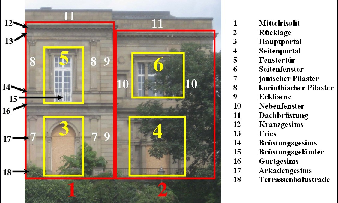 Stuttgart, Villa Berg, Südfassade, Erklärung der Bauteile.